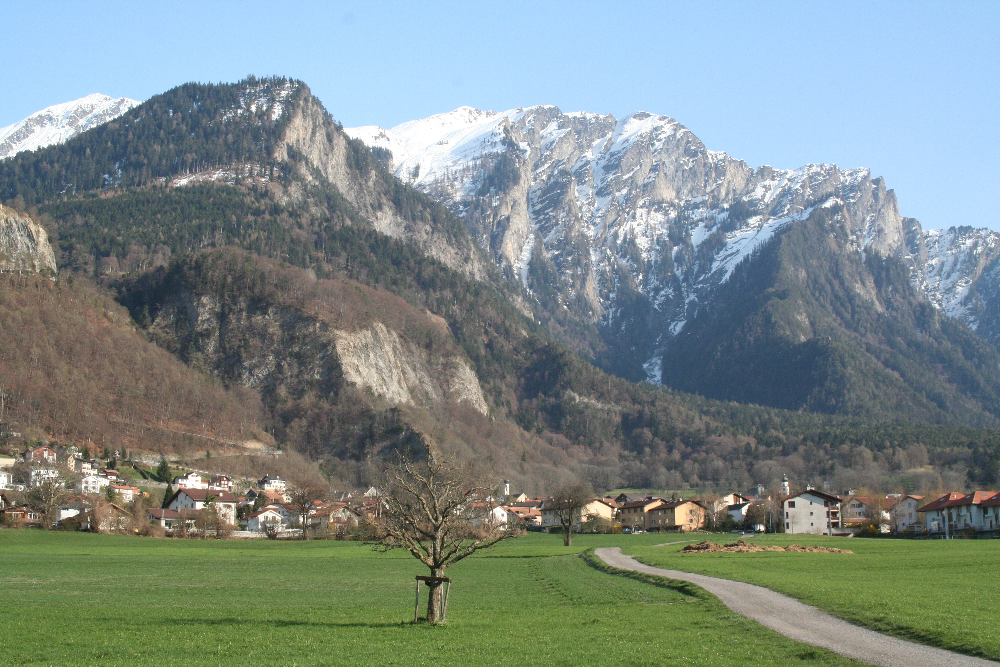 Trimmis GR